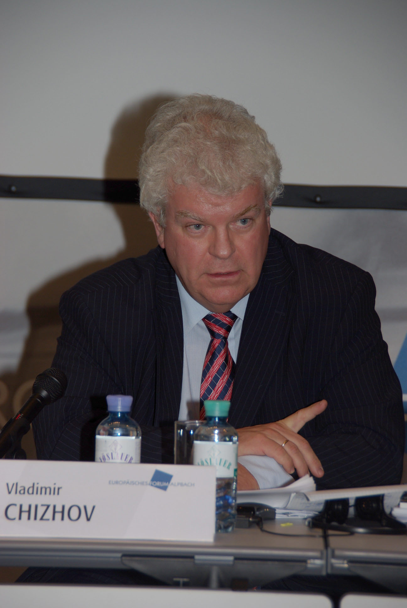 Russischer Botschafter Vladimir Chizhov beim Forum Alpbach (2008)